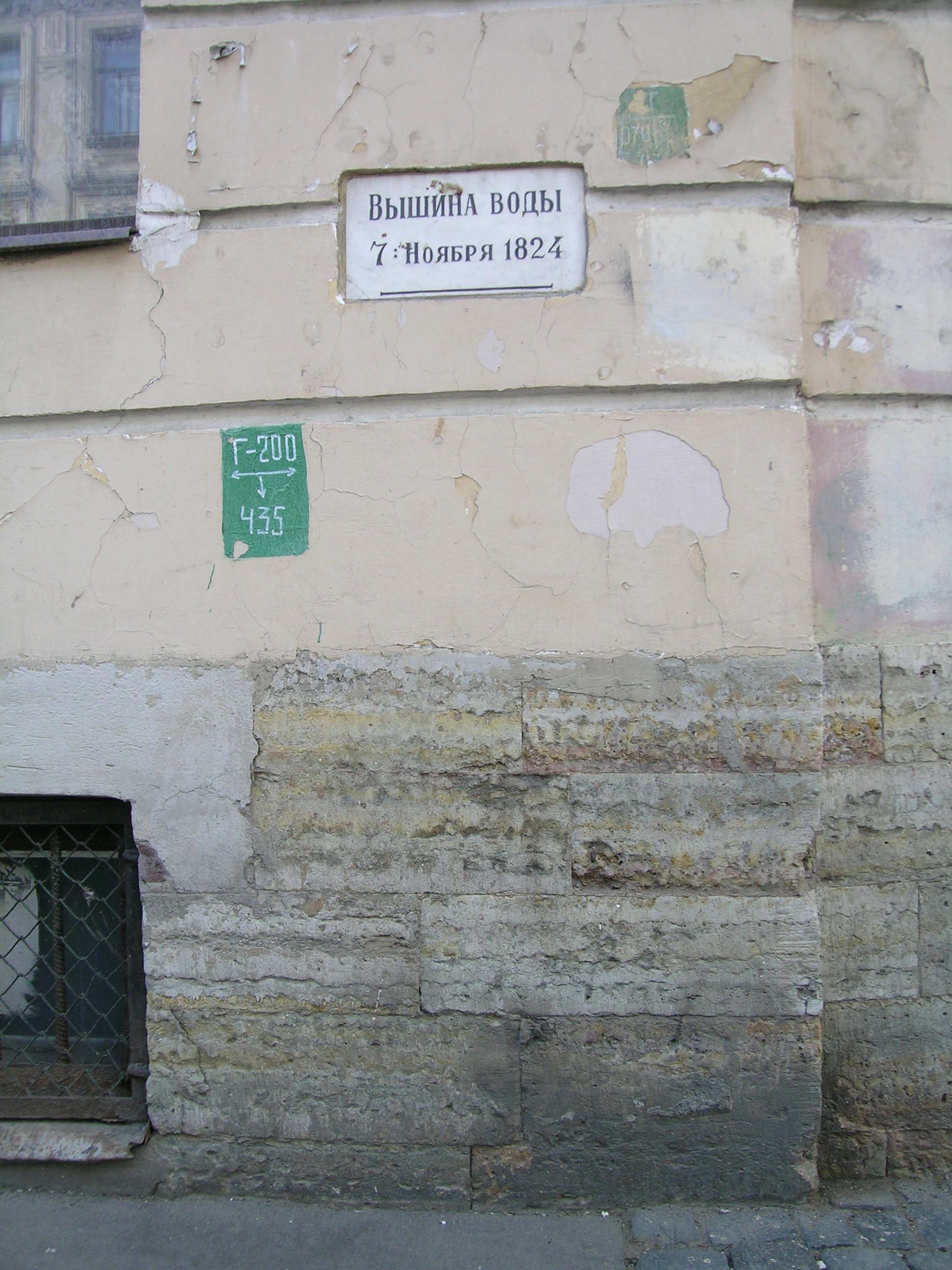 Вышина воды 7 Ноября 1824